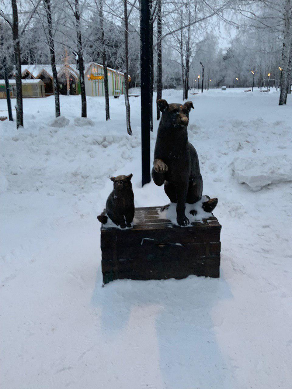 Фигура собаки и кошки находится в городском парке "Семья". Этот памятник — одна из 50 идей к юбилею города, которая набрала большее количество голосов горожан в Интернете, после чего ее и решено было исполнить.